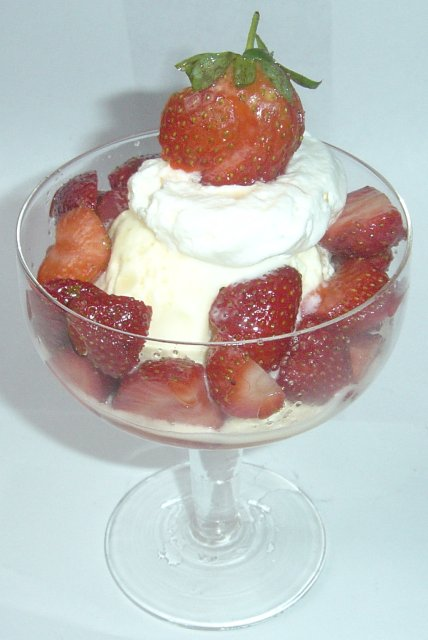 Fresas con crema, Platillo tradicional Merideño de Venezuela